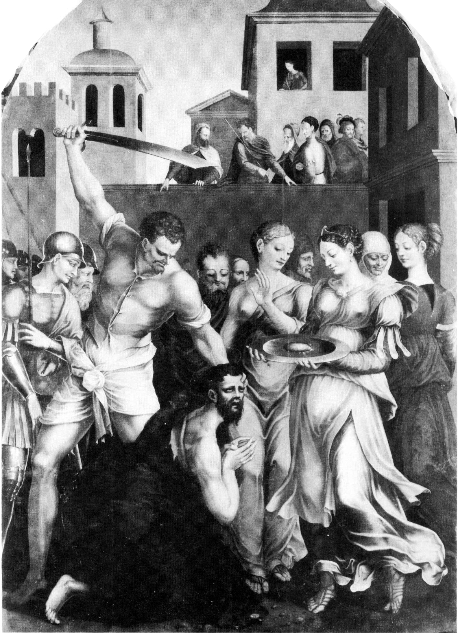 ´Jerónimo Cósida, Degollación de San Juan Bautista. Tabla central del retablo de la Degollación de San Juan Bautista. Iglesia de Calcena, Zaragoza, (1554-1559)